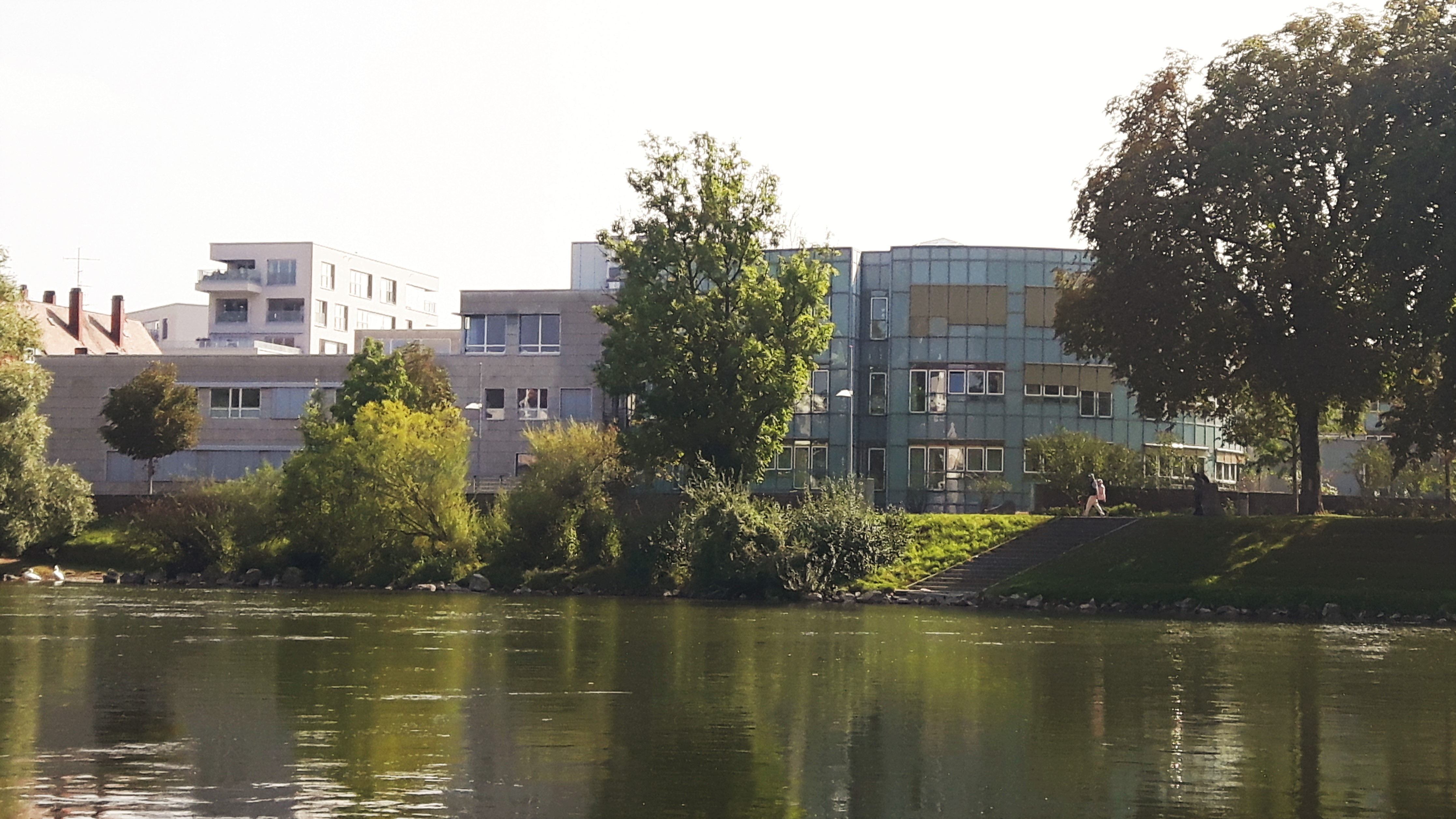 Die Donauklinik am Neu-Ulmer Donauufer.